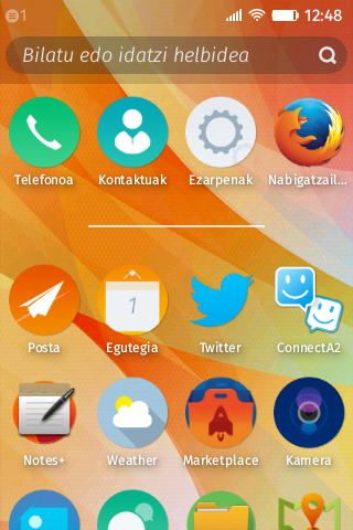 B2G 2.1 prerelease screenshot Basque